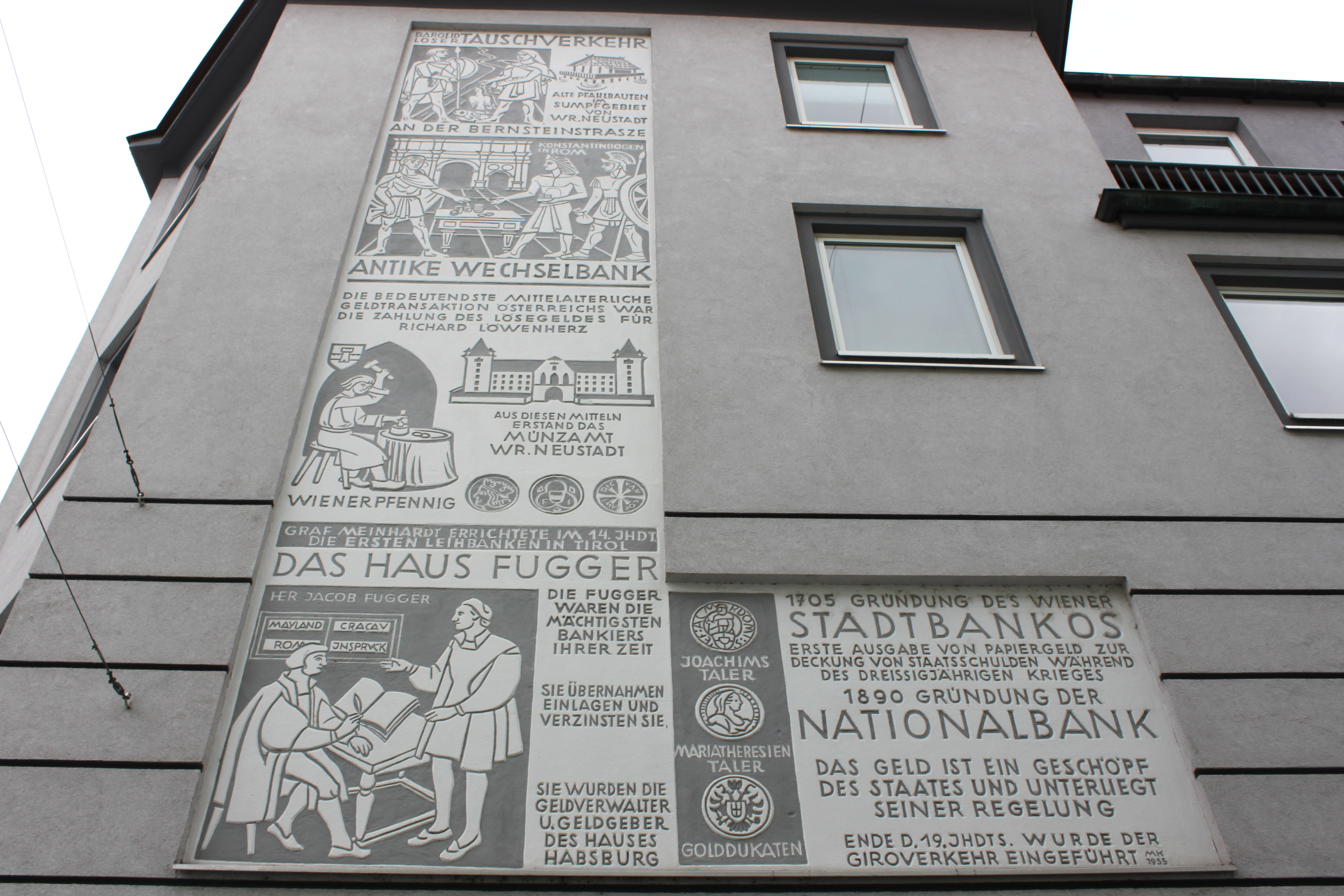 Wiener Neustadt, Volksbank in der Herzog-Leopold-Straße 3, Fassadendetail Allerheiligengasse, Kunst am Bau